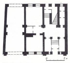 Мінск. Рэвалюцыйная. План 1-га паверха дома № 8